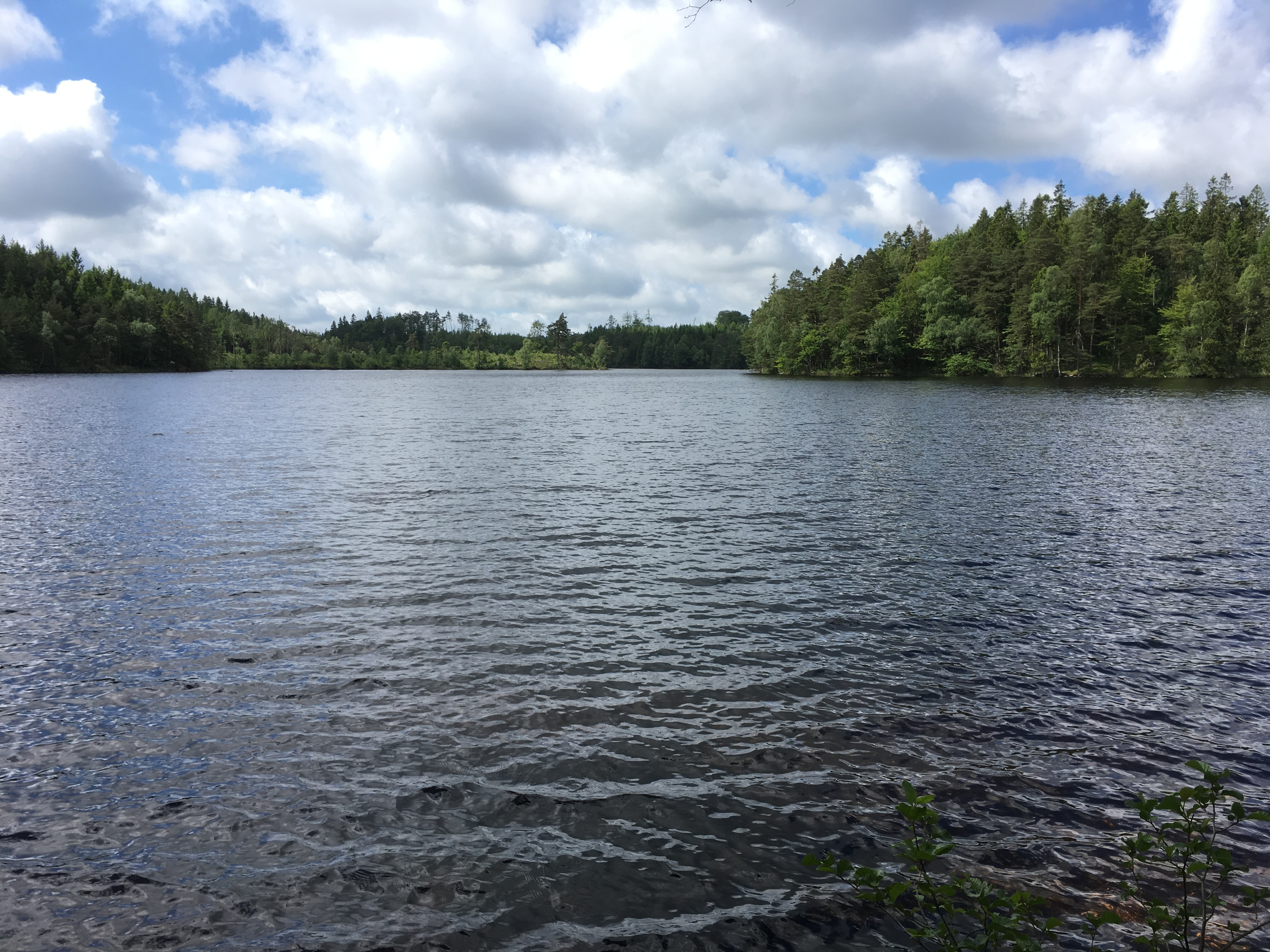 Kroksjö i Veddige socken från sjöns norra ände. Hallandsleden passerar på sjöns östra och norra sida.